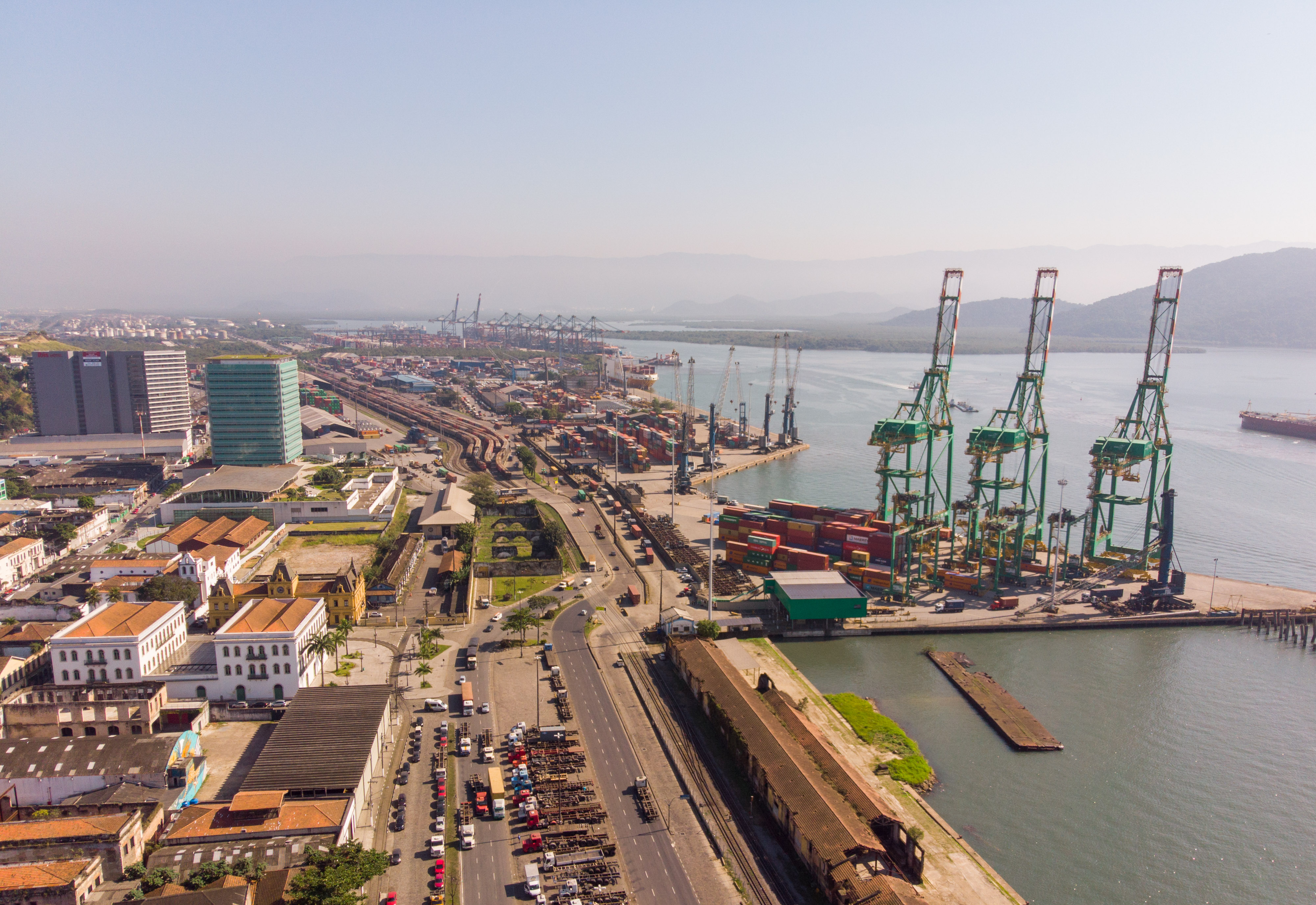 O governador Márcio França, participa do Seminário da TV Tribuna em Santos. Local: Santos/SP Data: 25/06/2018. Foto: Governo do Estado de São Paulo